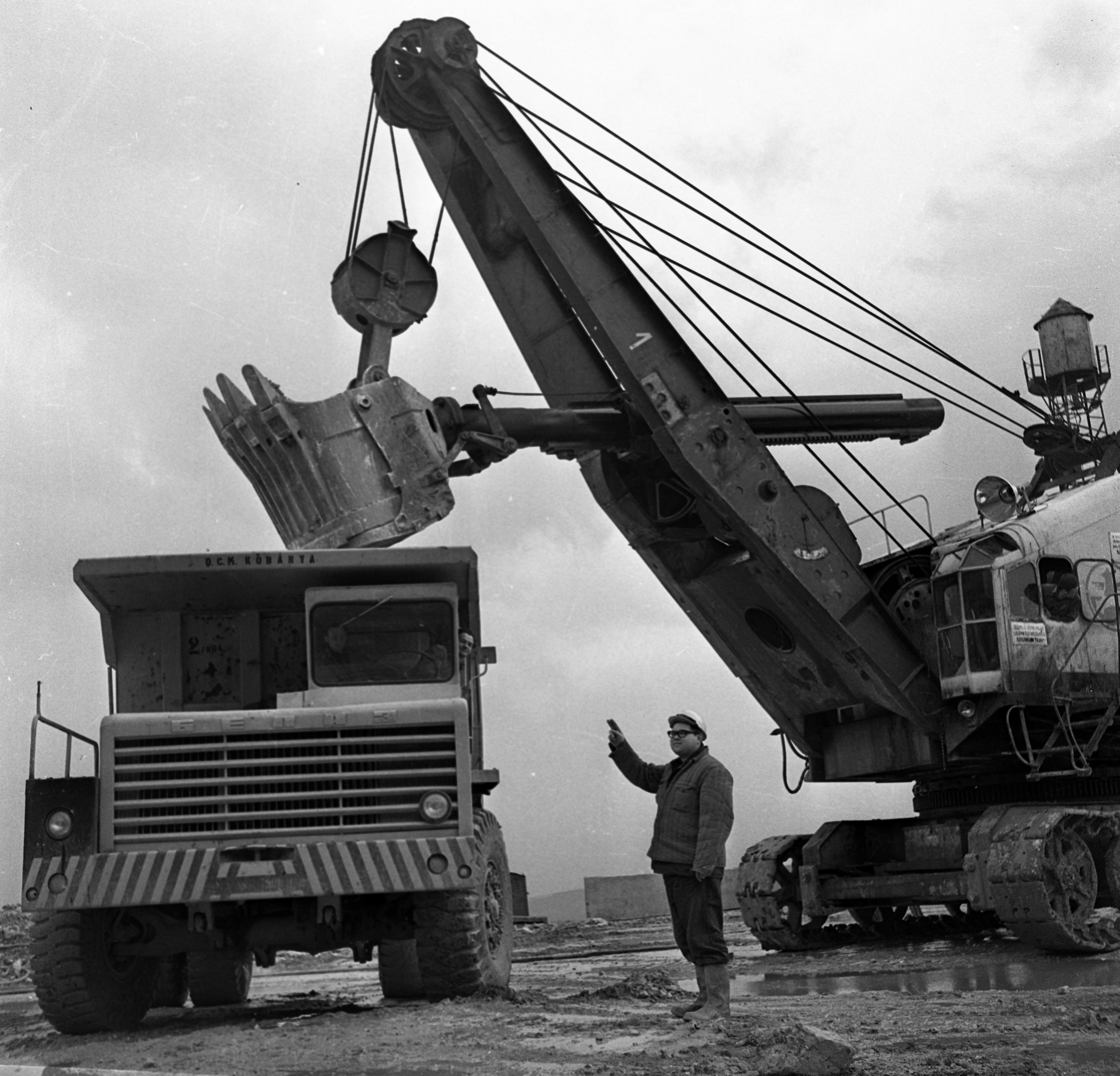 a Dunai Cement- és Mészmű mészkőfejtője a Naszály hegyen. Location: Hungary, Vác Tags: BelAZ-brand, Soviet brand, machine, excavator, mining, stone mine, commercial vehicle, tipper Title: a Dunai Cement- és Mészmű mészkőfejtője a Naszály hegyen.